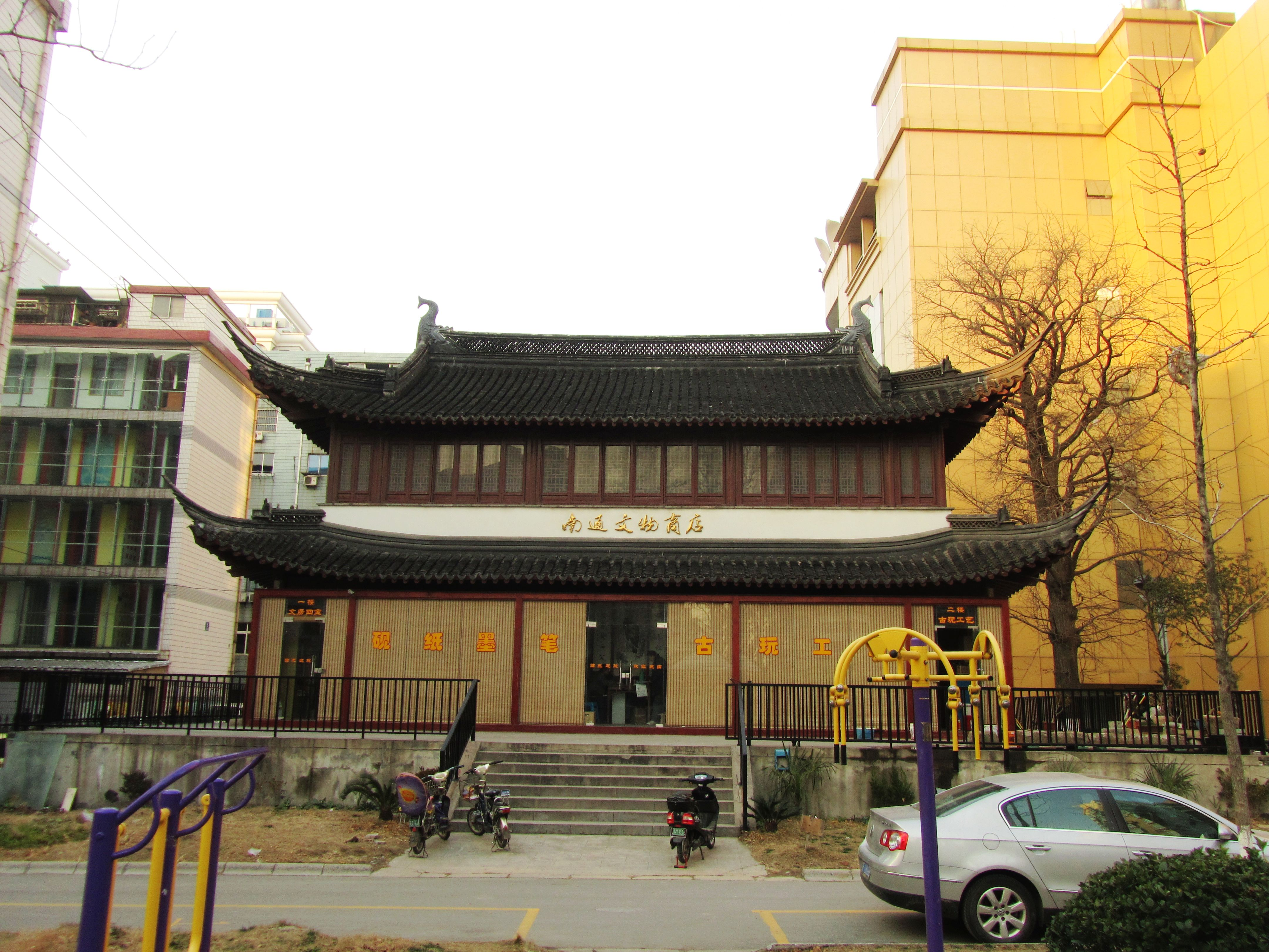 南通玄妙观玉皇阁，南立面。